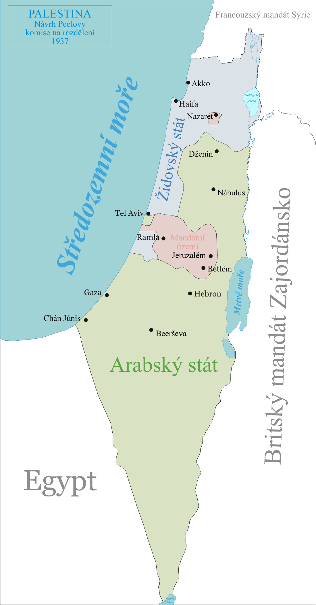 Mapa plánu Peelovy komise na rozdělení Palestiny, 1937. *Zelená - navrhovaný Arabský stát *Modrá - navrhovaný Židovský stát *Růžová - navrhovaná mezinárodní neutrální zónaproposed international neutral zone